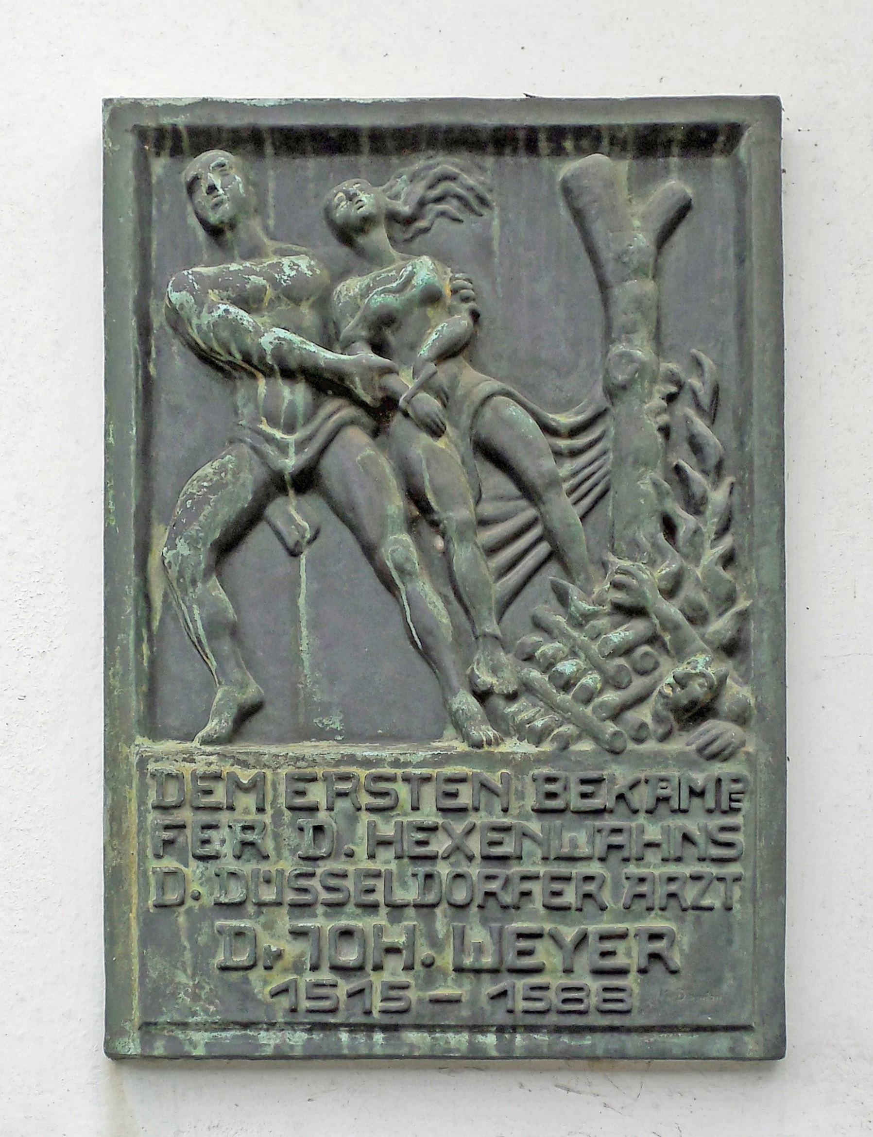 Gedenktafel für Dr. Johann Weyer, dem ersten Bekämpfer des Hexenwahns, 1926